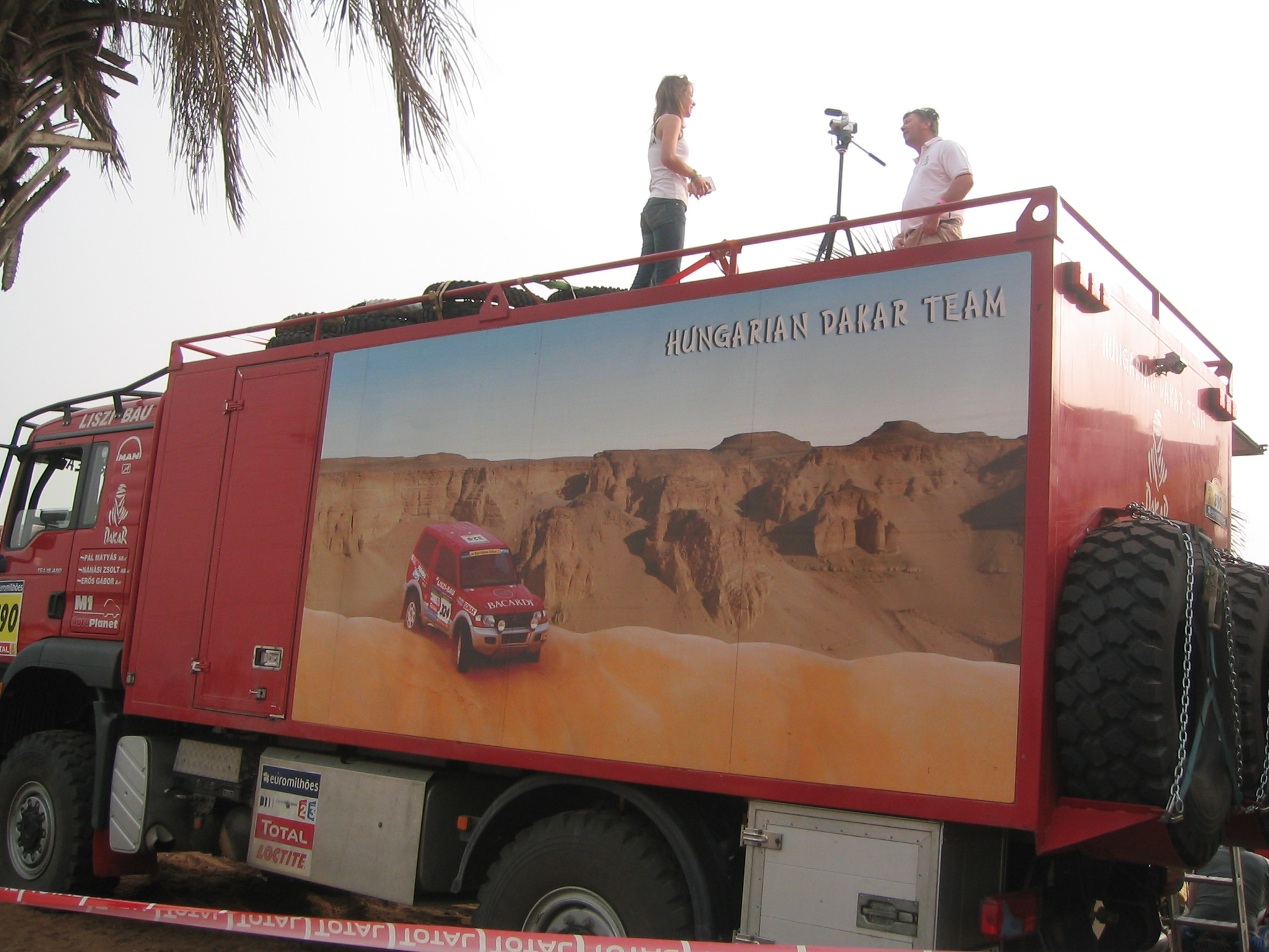 Camion hongrois ayant participé au Rallye Lisboa Dakar 2007, avec une journaliste hongroise effectuant une interview sur le toit. Photo prise le samedi à l'hôtel Méridien de Dakar (Sénégal)